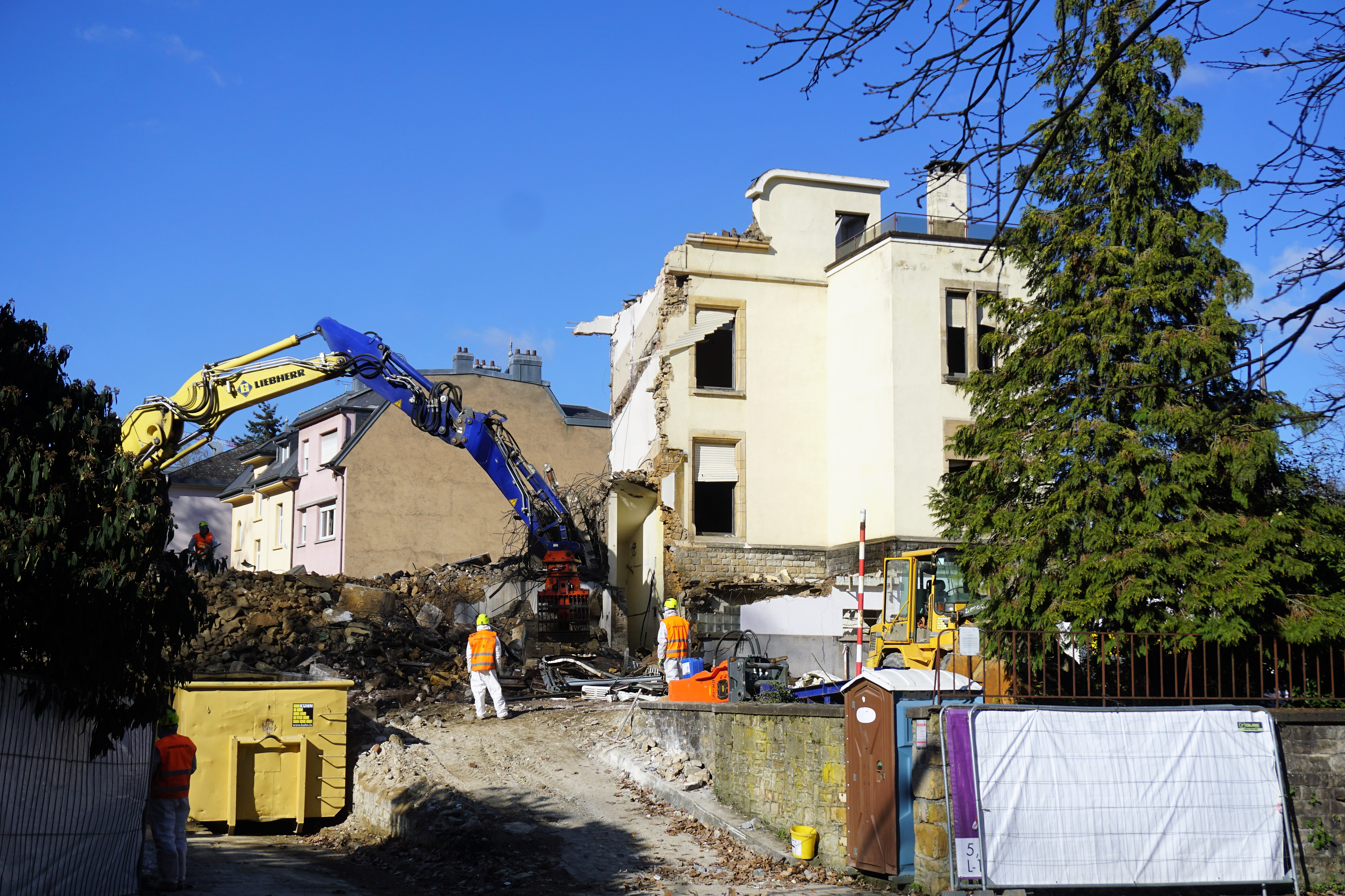 Démolition de la Villa Elisabeth afin de permettre la construction d'in immeuble à 21 appartements.